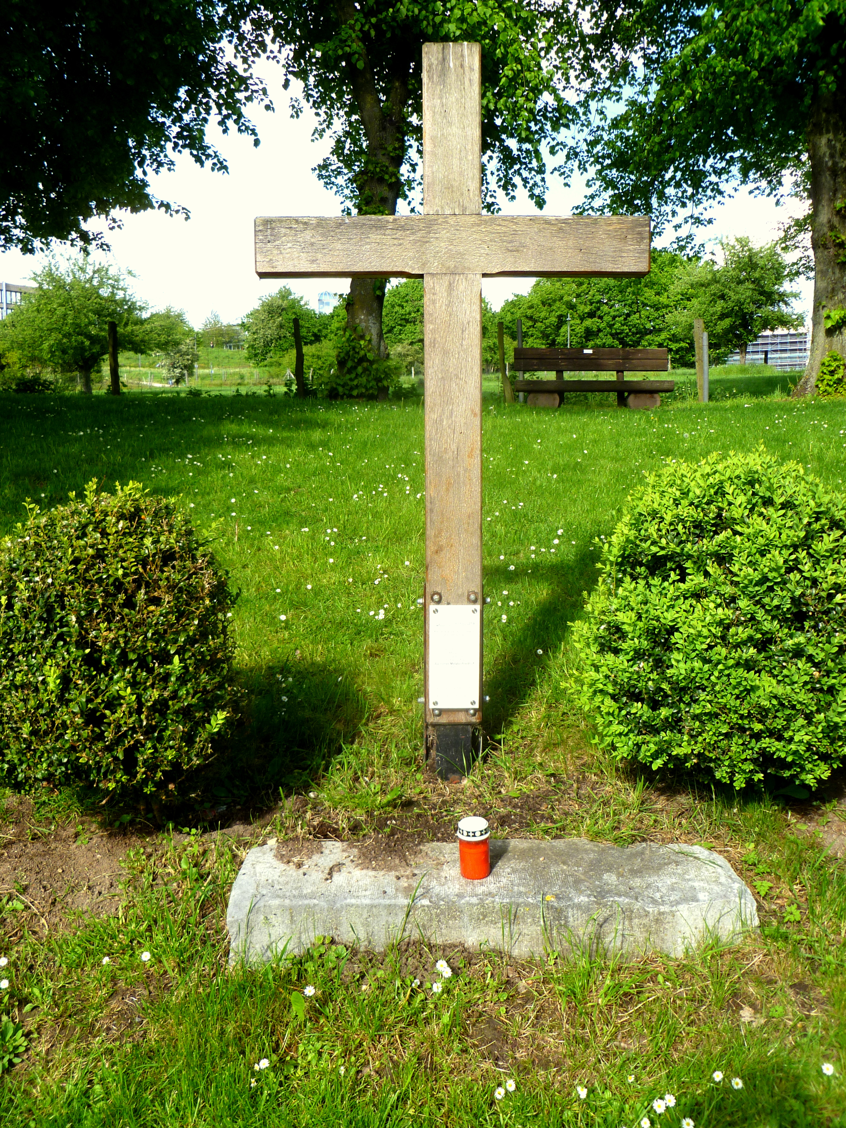 Erinnerungskreuz an Gut Melaten im Auftrag der Melaten-Gesellschaft e.V., gestiftet von der Familie Albert Huesch sowie Freunde und Förderer. Inschrift: "Errichtet am 7. Mai 2011 zum Gedenken an die hier auf dem Aachener Melatenfriedhof Bestatteten."